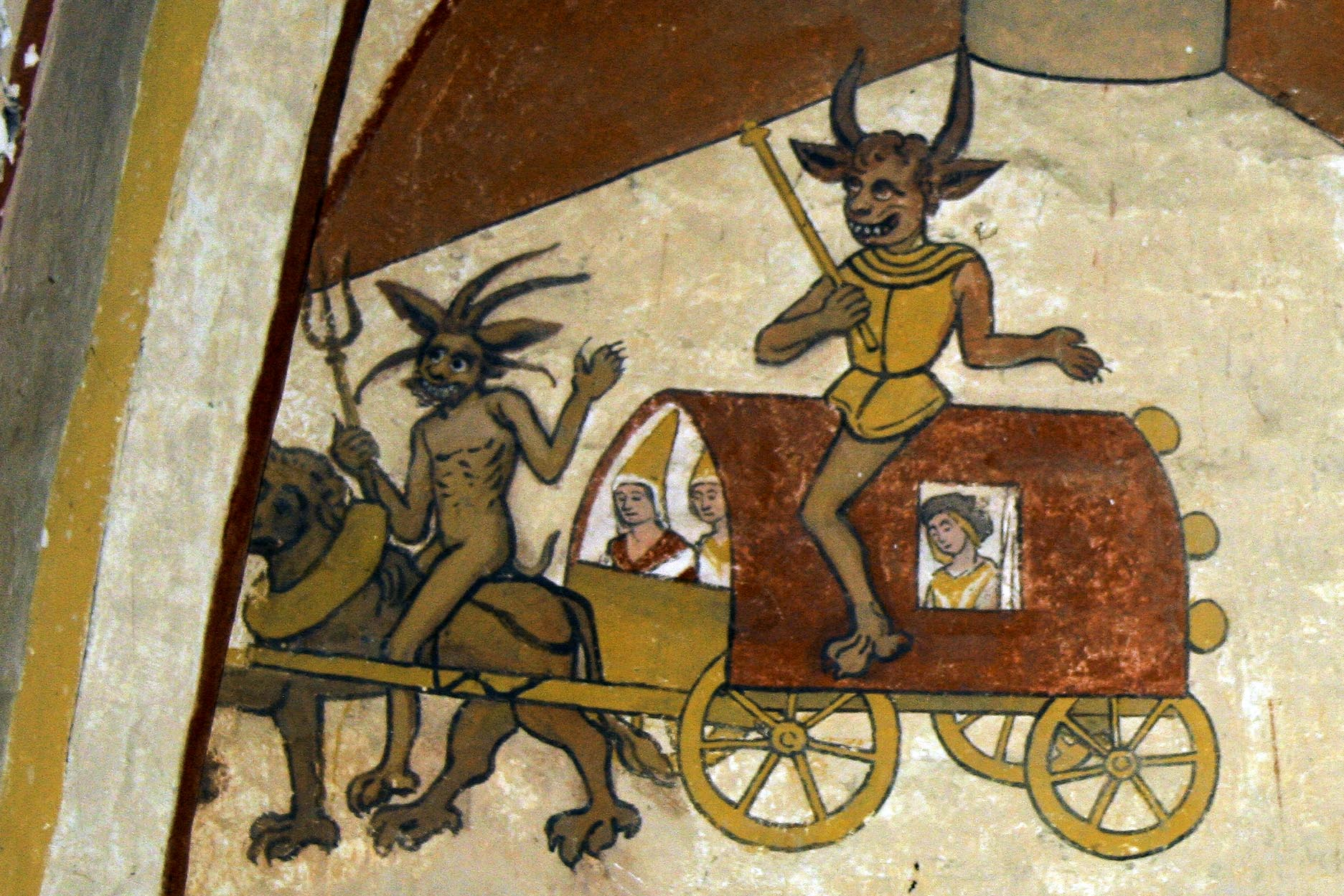 Diables, peinture murale, église de Bagnot (Côte-d'Or), France